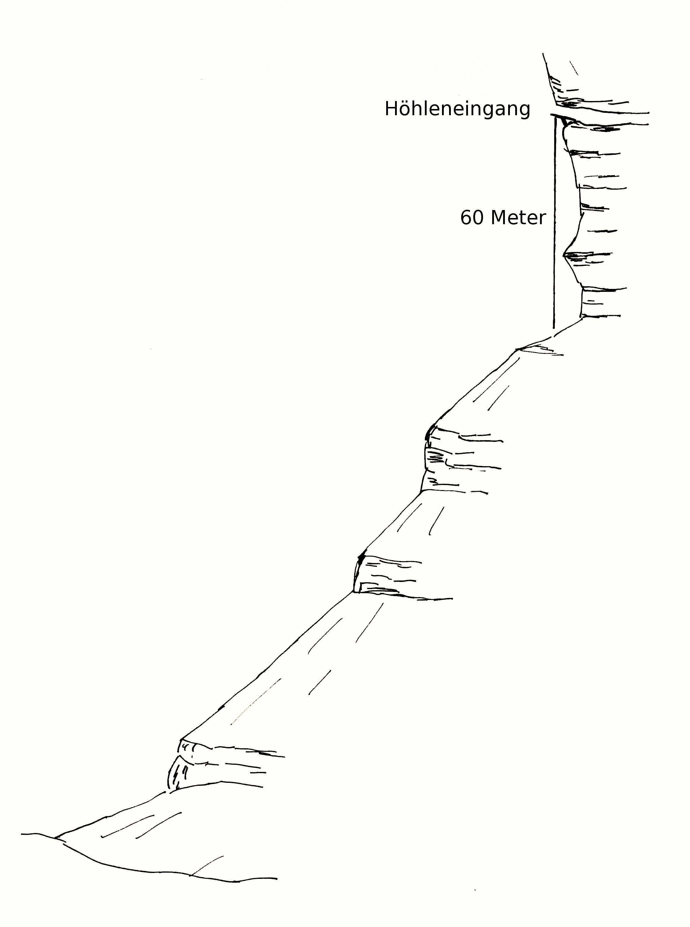 Profil Geltenbachwasserfall im Gasterntal